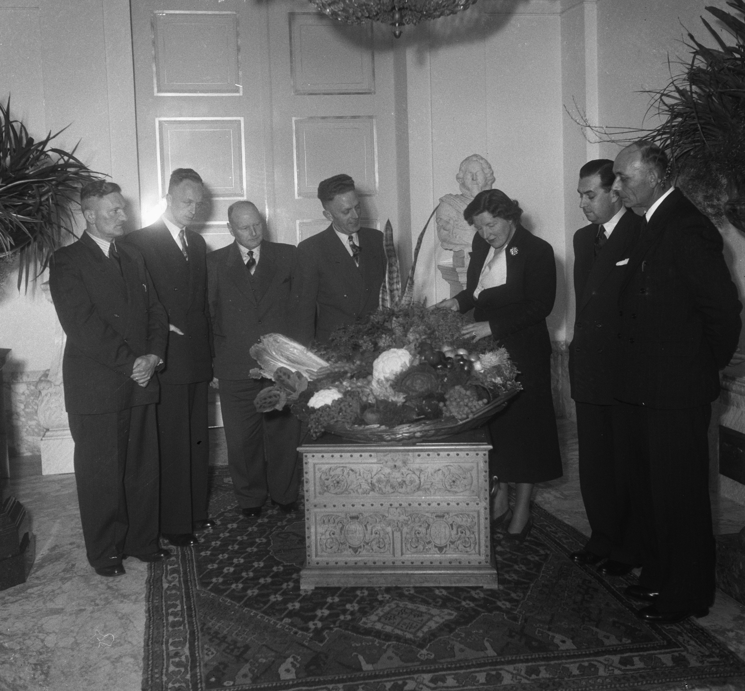 Collectie / Archief : Fotocollectie Anefo Reportage / Serie : [ onbekend ] Beschrijving : Aanbieden van tuinbouwproducten door veiling De Tuinbouw te Grootebroek aan koningin Juliana op paleis Soestdijk. 2e van rechts P.J. Cramwinckel (burgemeester van Grootebroek). In het midden veilingvoorzitter A.J. de Boer Datum : 7 december 1951 Locatie : Soestdijk, Utrecht Trefwoorden : geschenken, groente, groepsportretten, koninginnen, koninklijk huis, veilingen Persoonsnaam : Boer A. J De, Cramwinckel P.J., De Tuinbouw, Juliana, koningin Fotograaf : Noske, J.D. / Anefo Auteursrechthebbende : Nationaal Archief Materiaalsoort : Negatief (zwart/wit) Nummer archiefinventaris : bekijk toegang 2.24.01.03 Bestanddeelnummer : 904-8770